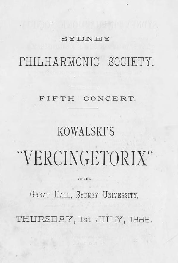 Affiche de la symphonie Vercingetorix d'Henri Kowalski (1886)